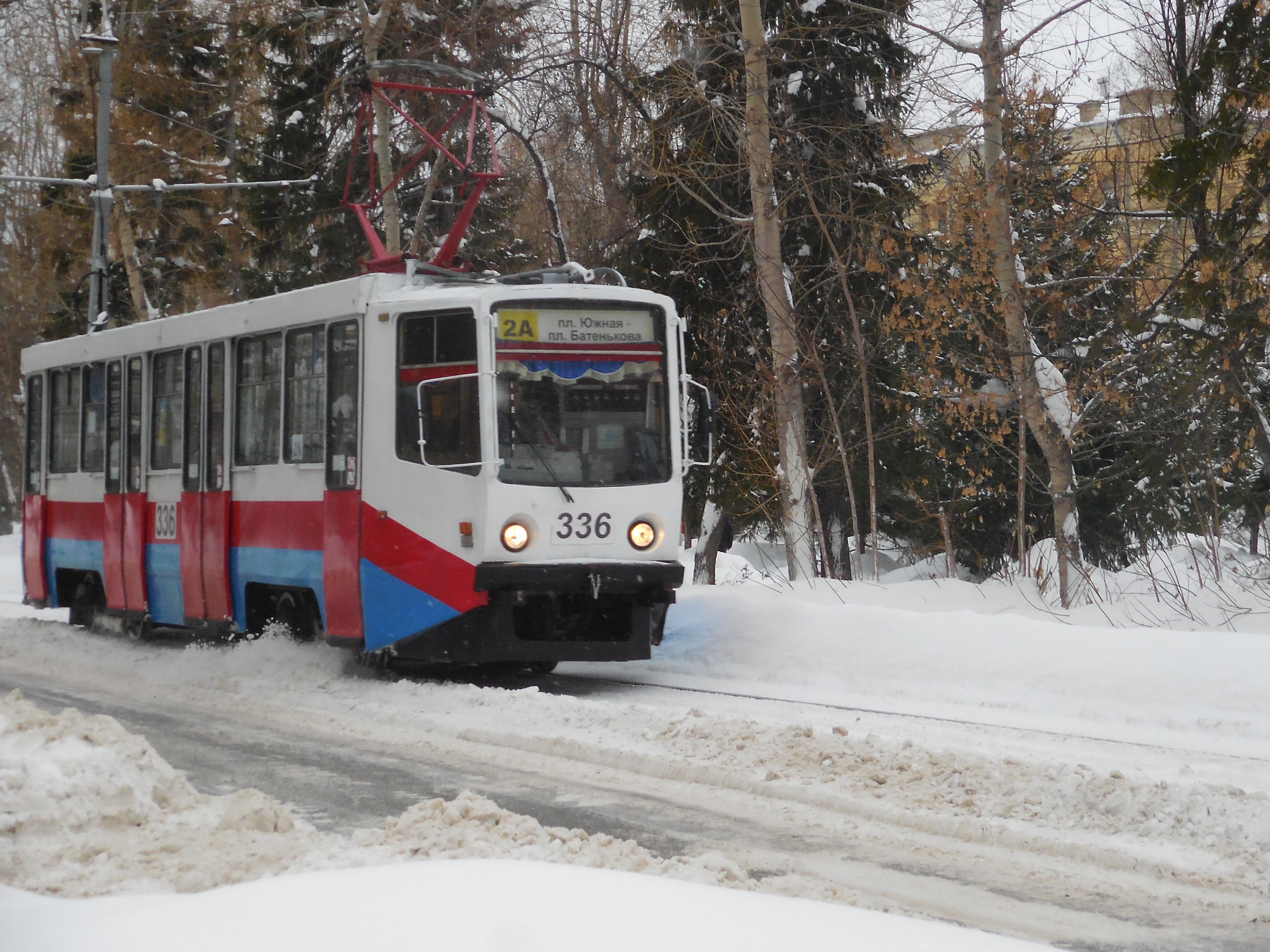 Трамвай 71-608КМ в Томске (пр. Кирова)